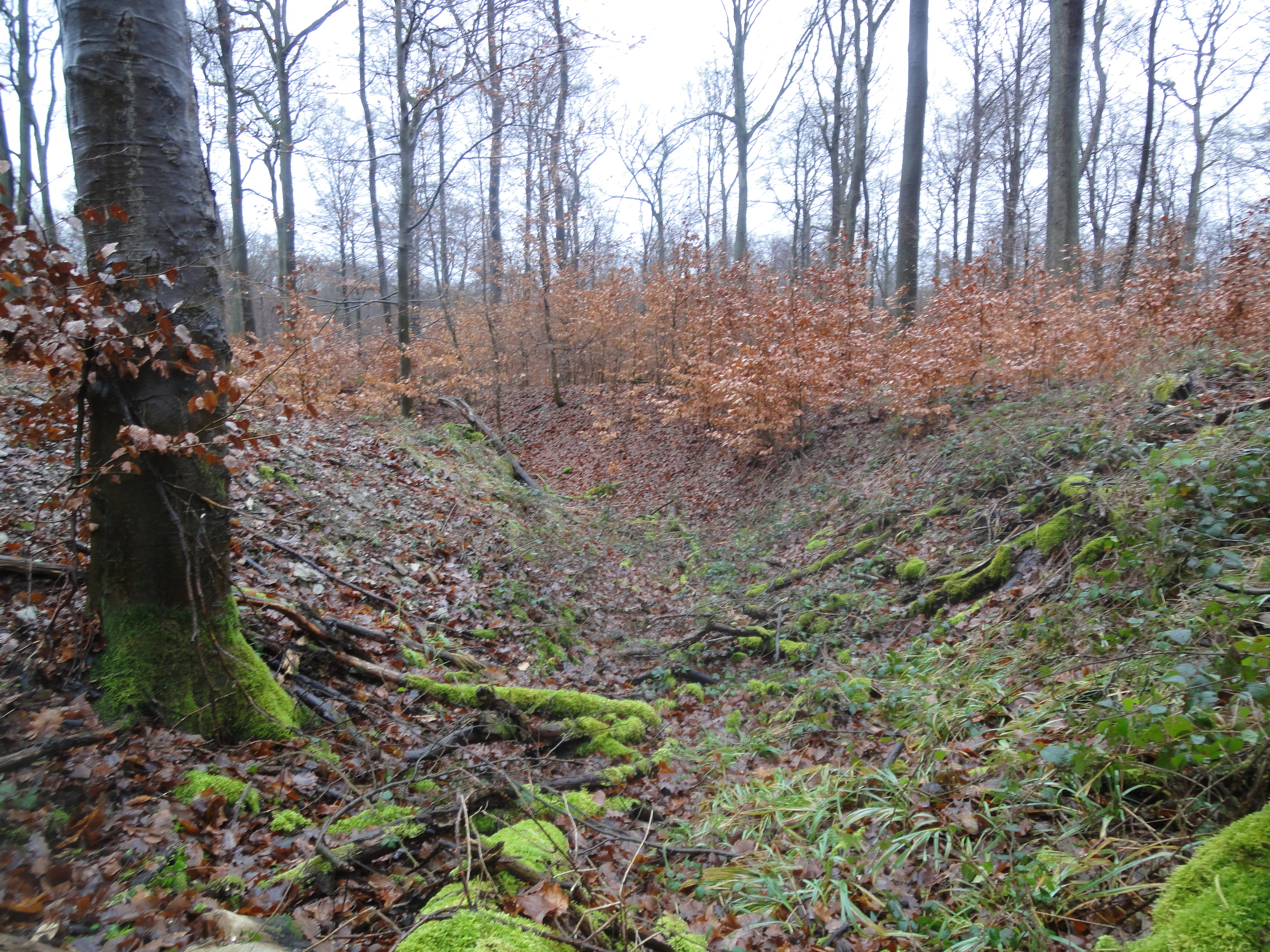 Der Graben der Schanze Weisel